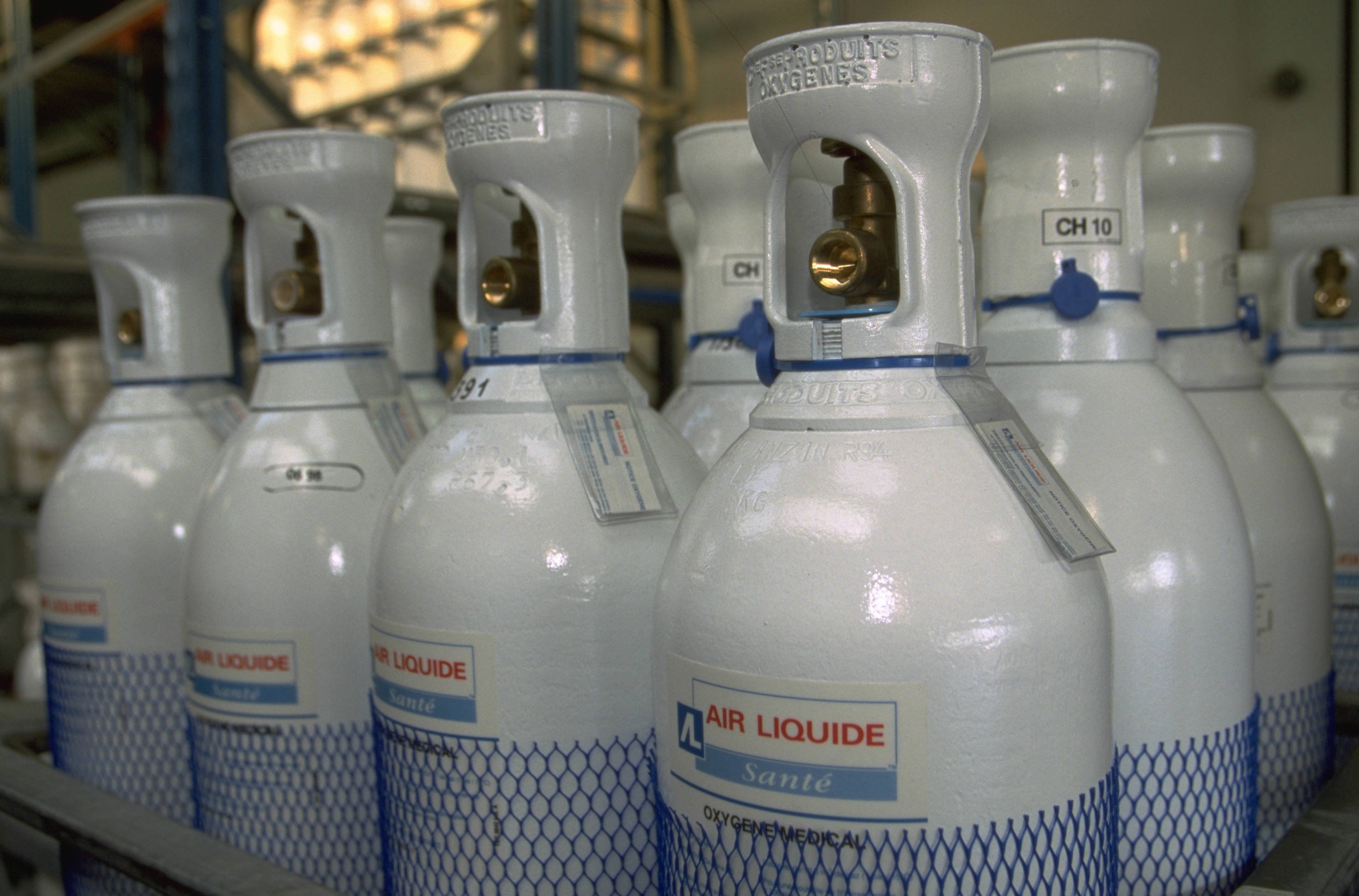 Баллоны с мед. кислородом